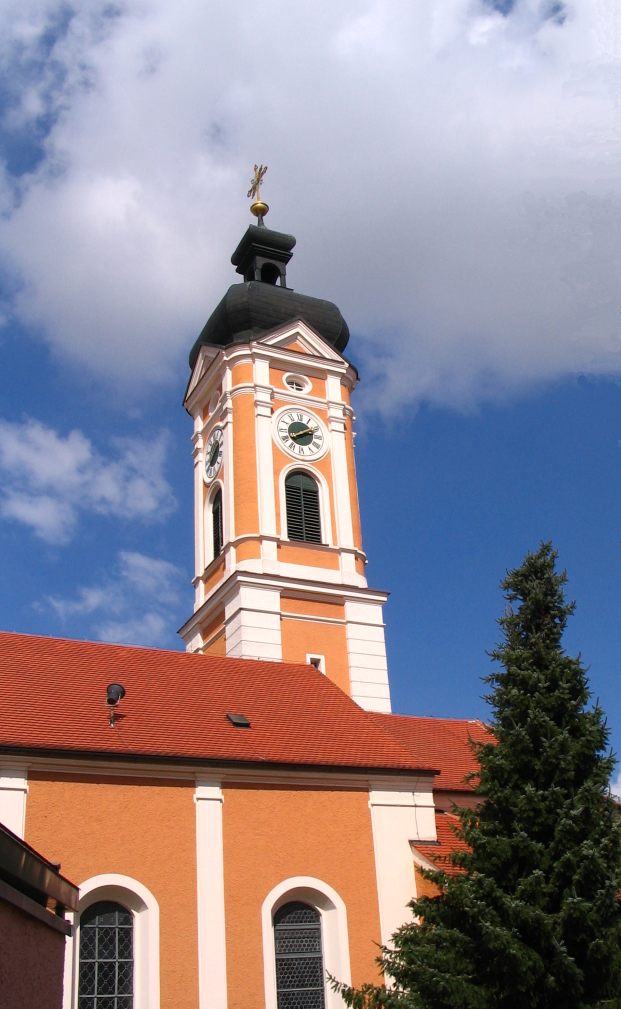 Kath Pfarrkirche St. Georg in Painten, Landkreis Kelheim, Niederbayern